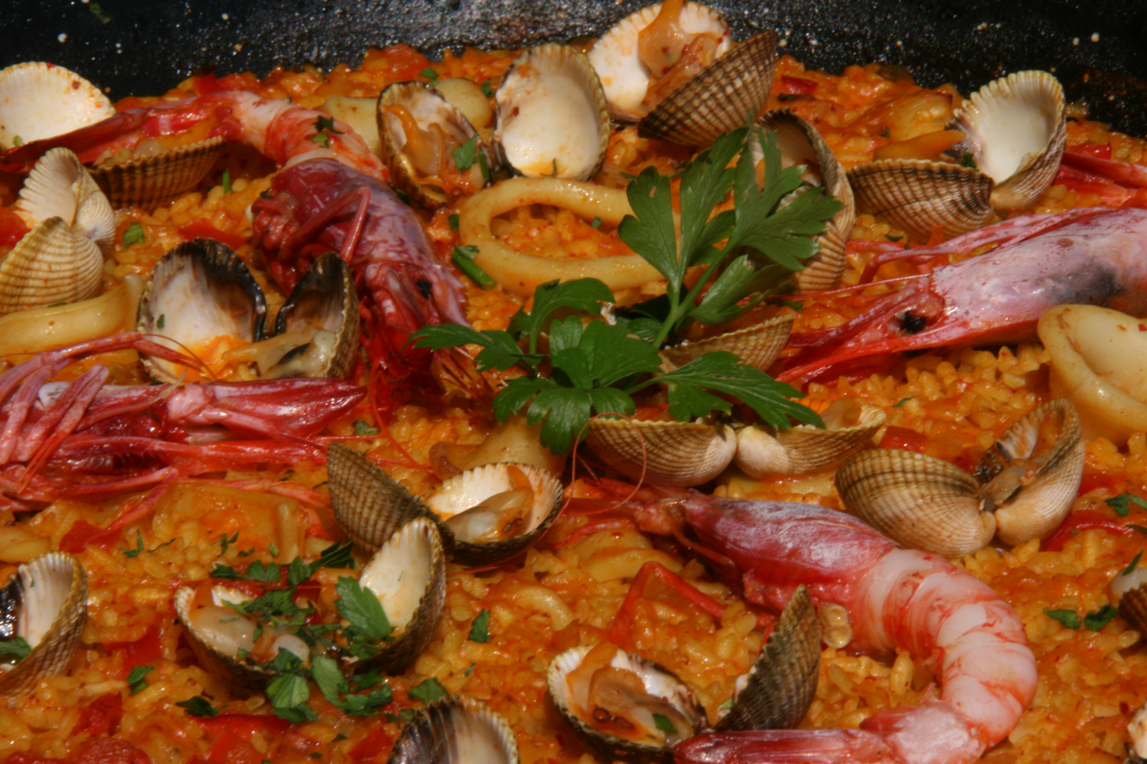 Detalle de la paella